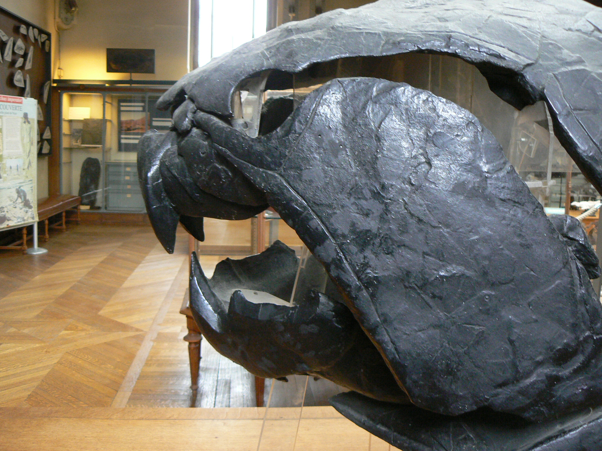 Dunkleosteus